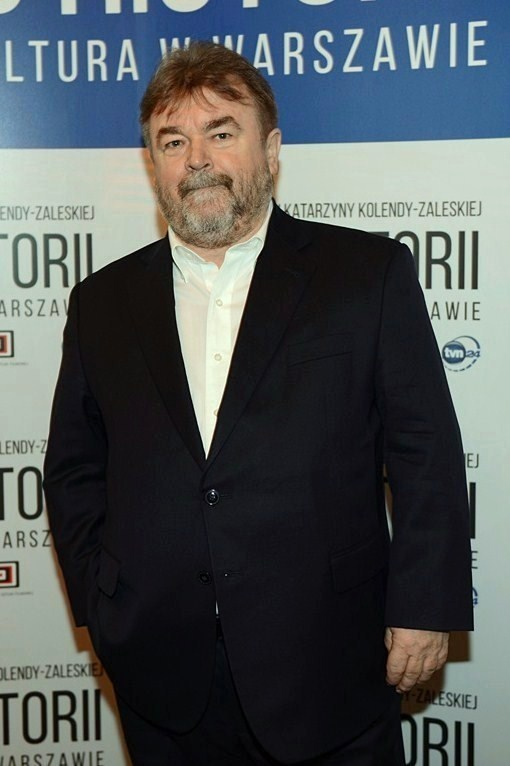 Edward Miszczak, dziennikarz.